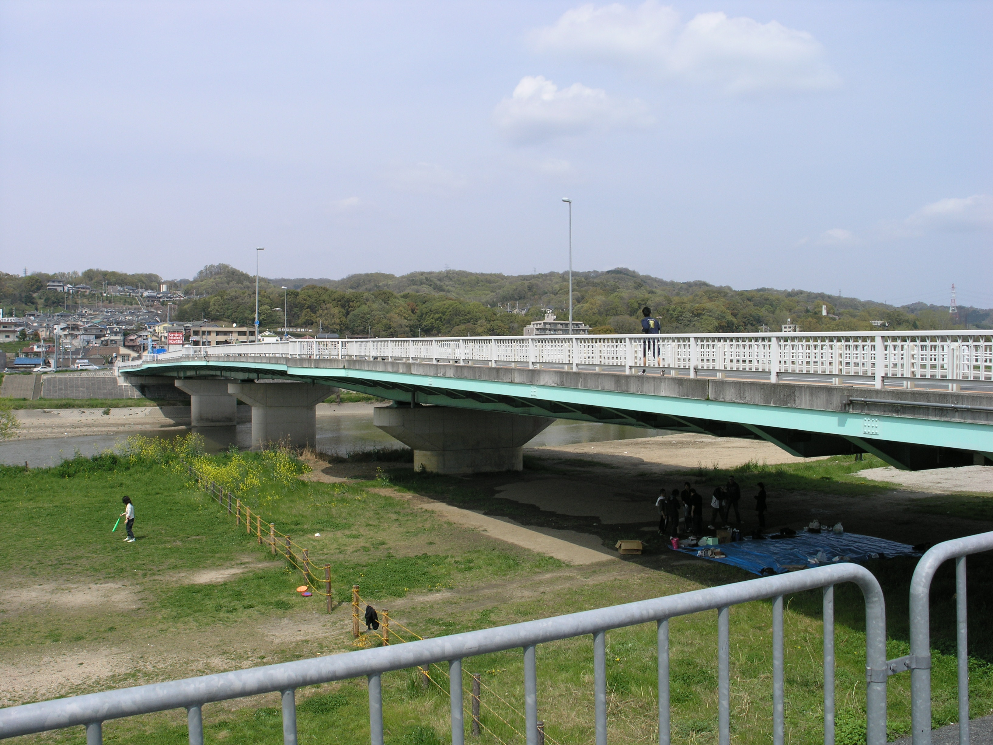 Kunitoyo-Bridge in Kashiwara, Japan